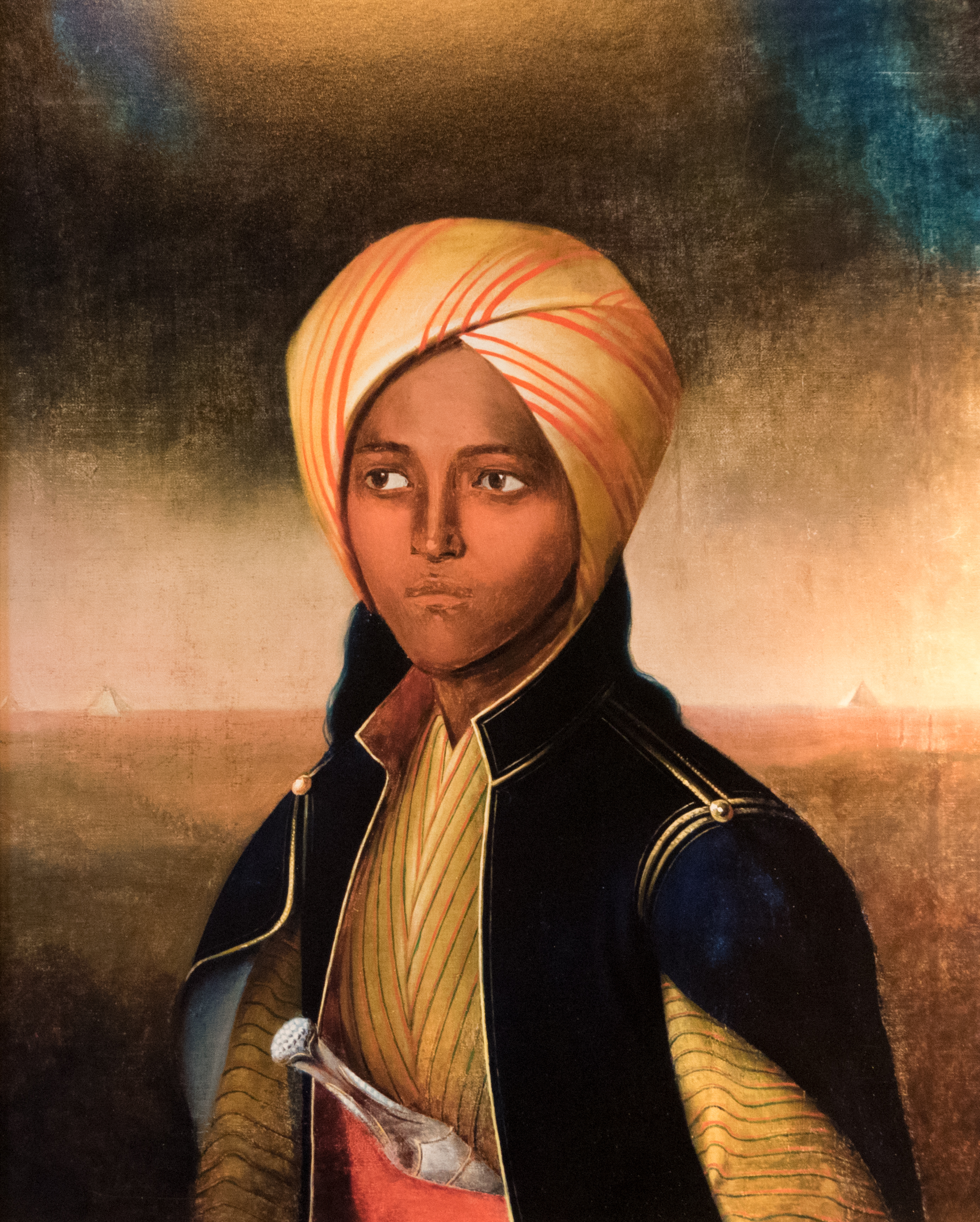 Schloss Branitz in Brandenburg. Das Innere des Schlosses.